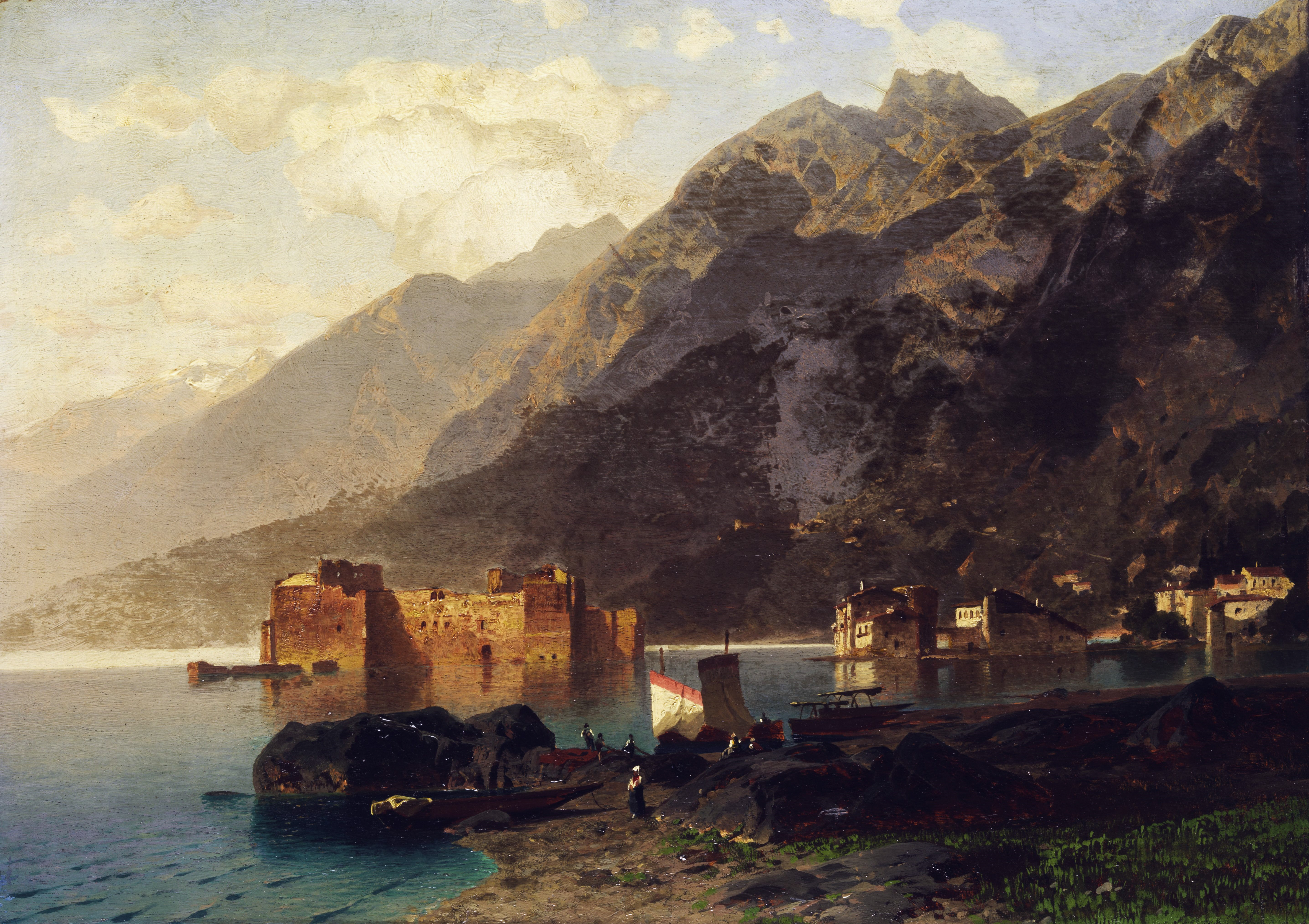 Landschaft am Gardasee, Öl auf Holz, 50 x 58 cm.